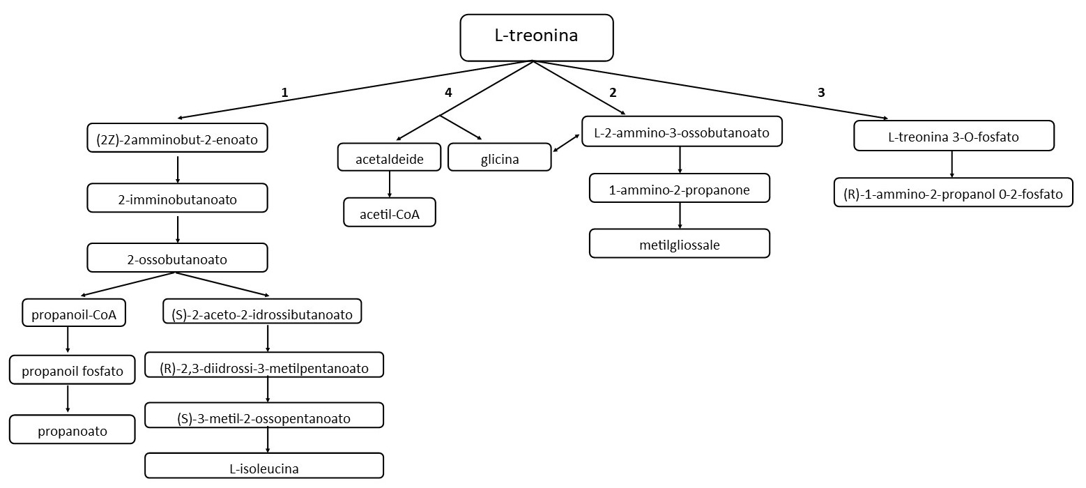 Schema della metabolizzazione della treonina